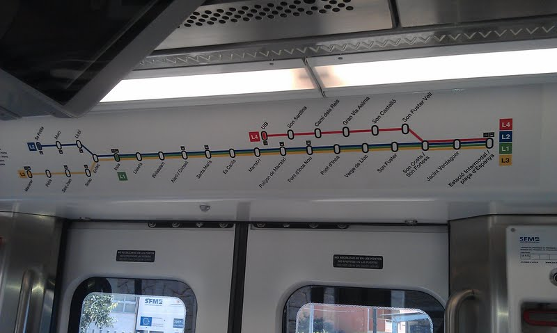 Esquema de lineas de SFM